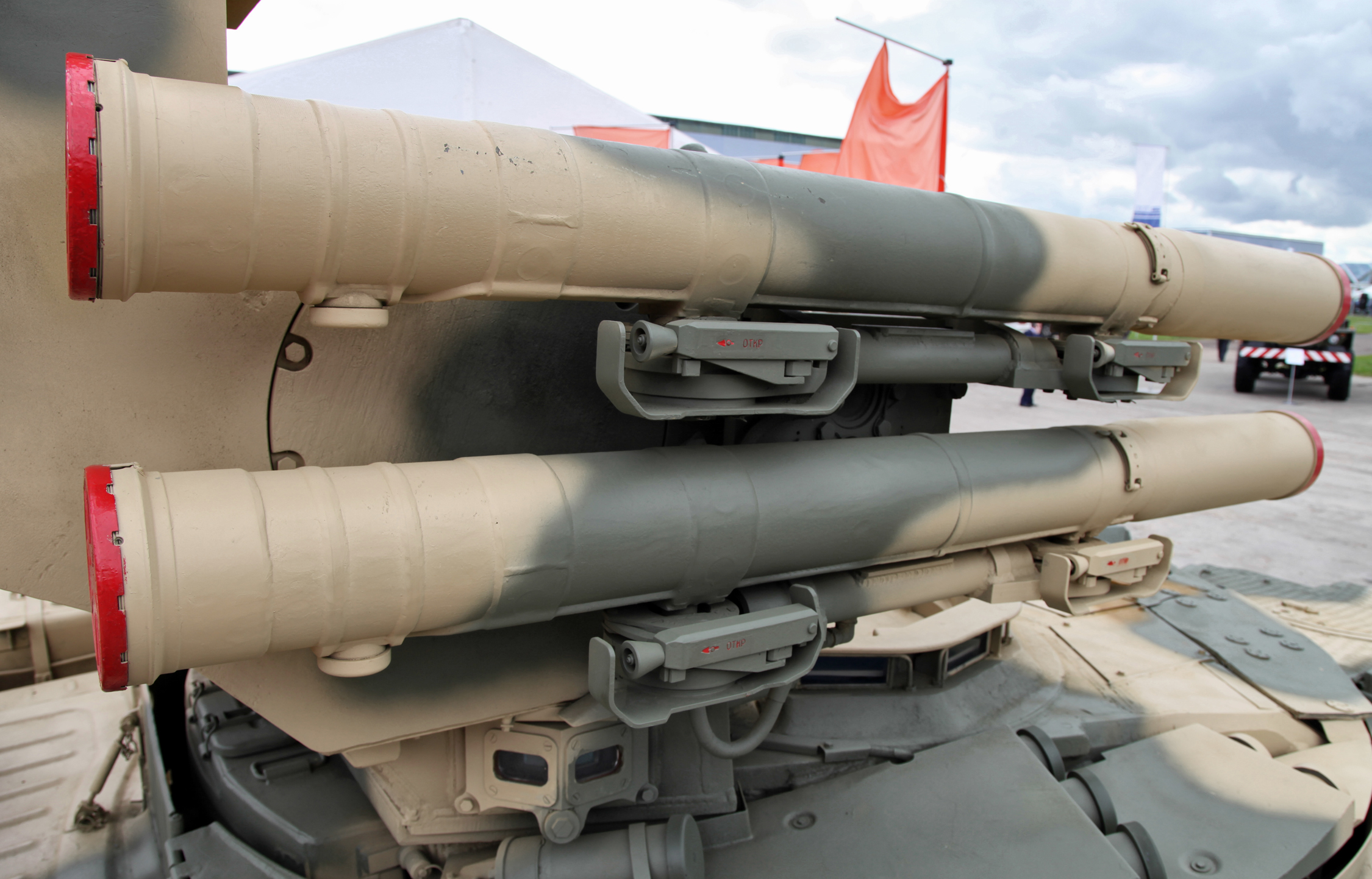 Боевая машина поддержки танков БМПТ (Tank support combat vehicle BMPT)